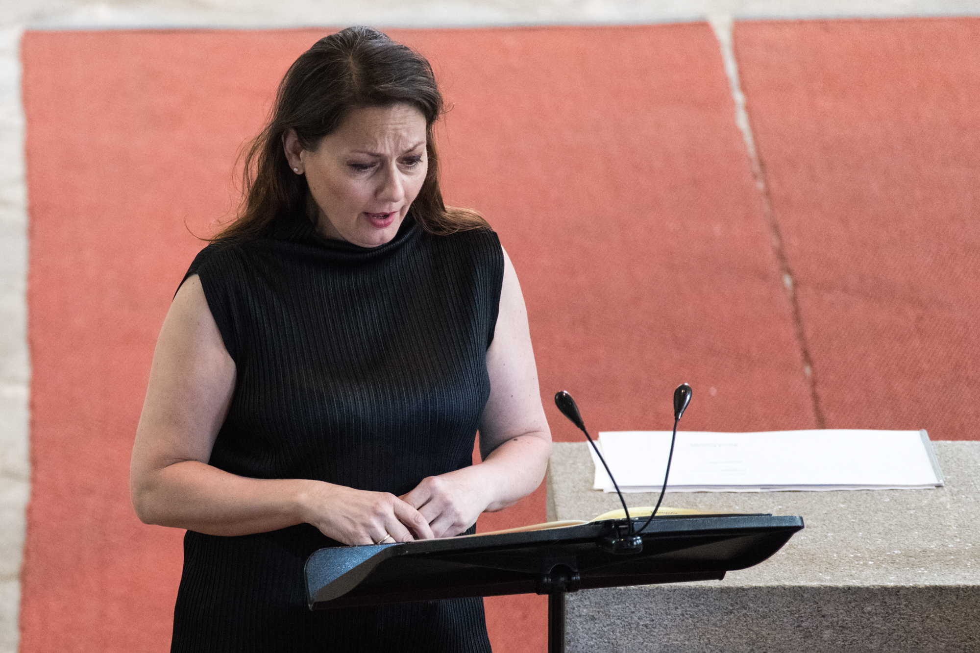 Landgänge 2019 in St. Peter bei Freistadt